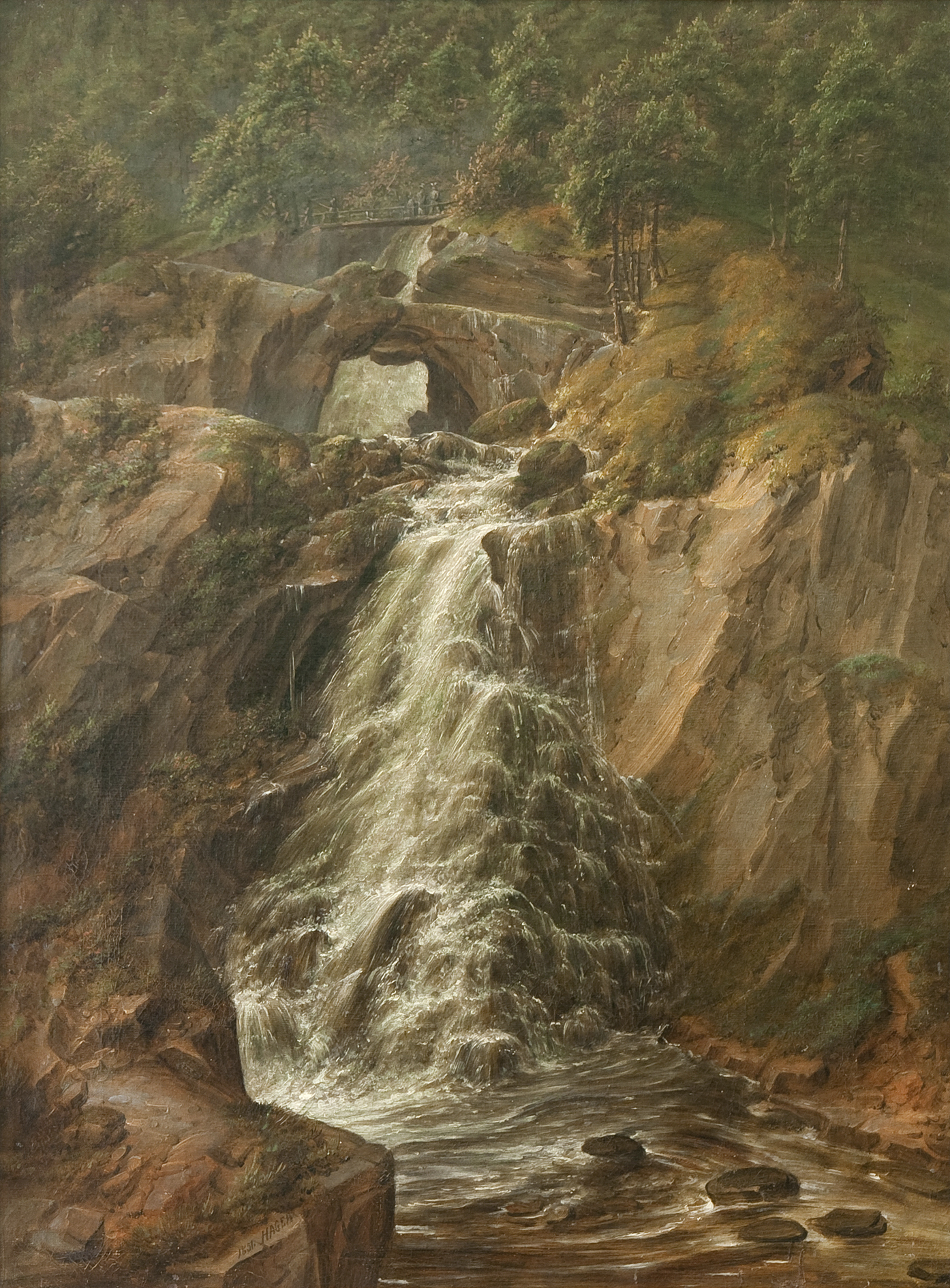 Авгус Маттиас Хаген. Водопад под Зальцбургом. 1851